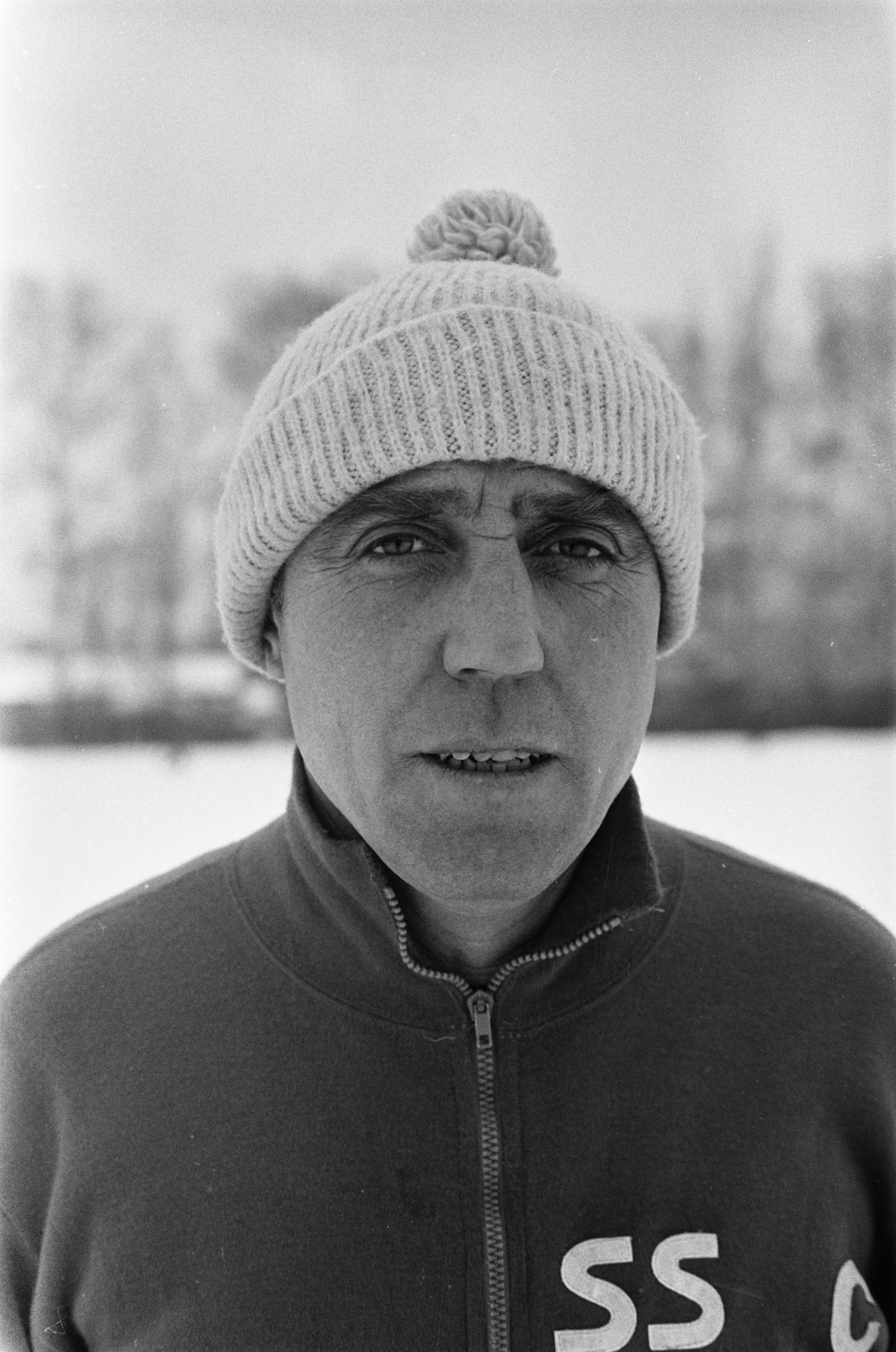 Collectie / Archief : Fotocollectie Anefo Reportage / Serie : [ onbekend ] Beschrijving : Spelers van Napoli trainen in Olympisch Stadion Amsterdam. Trainer Chiappella met ijsmuts Datum : 6 januari 1970 Locatie : Amsterdam, Noord-Holland Trefwoorden : sport, trainers, voetbal Persoonsnaam : Chiappella, Giuseppe Instellingsnaam : Napoli, Olympisch Stadion Fotograaf : Mieremet, Rob / Anefo Auteursrechthebbende : Nationaal Archief Materiaalsoort : Negatief (zwart/wit) Nummer archiefinventaris : bekijk toegang 2.24.01.05 Bestanddeelnummer : 923-1311